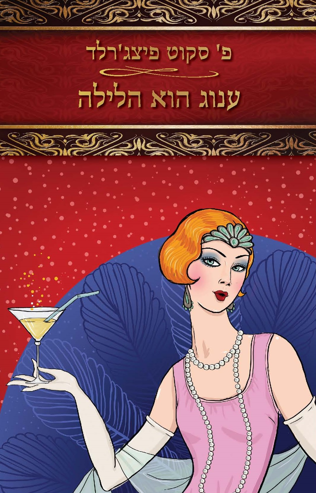 עטיפת הספר "ענוג הוא הלילה" שיצא לאור בהוצאה מחודשת בהוצאת אוריון